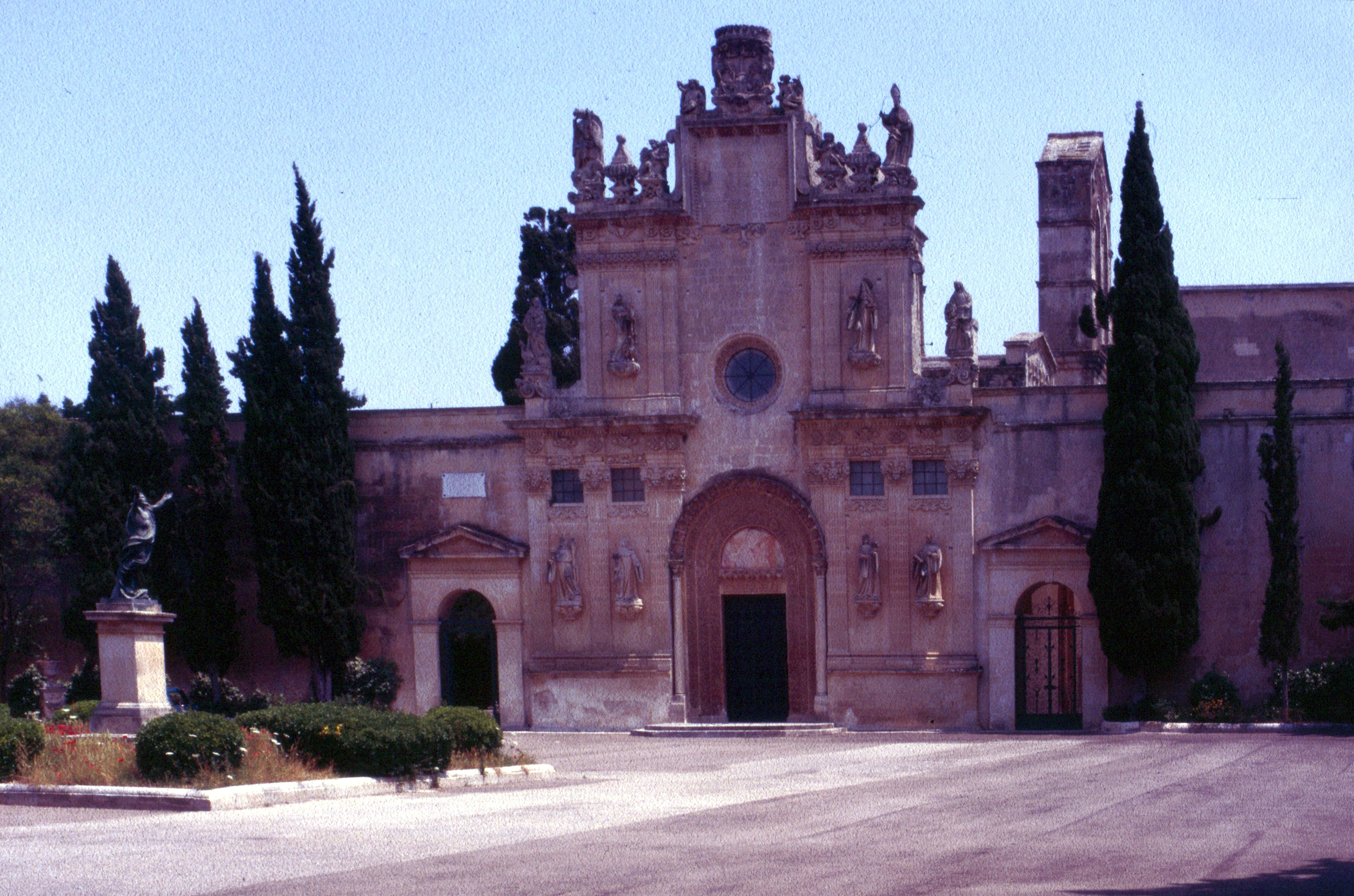 Santi Niccolò e Cataldo (Lecce)